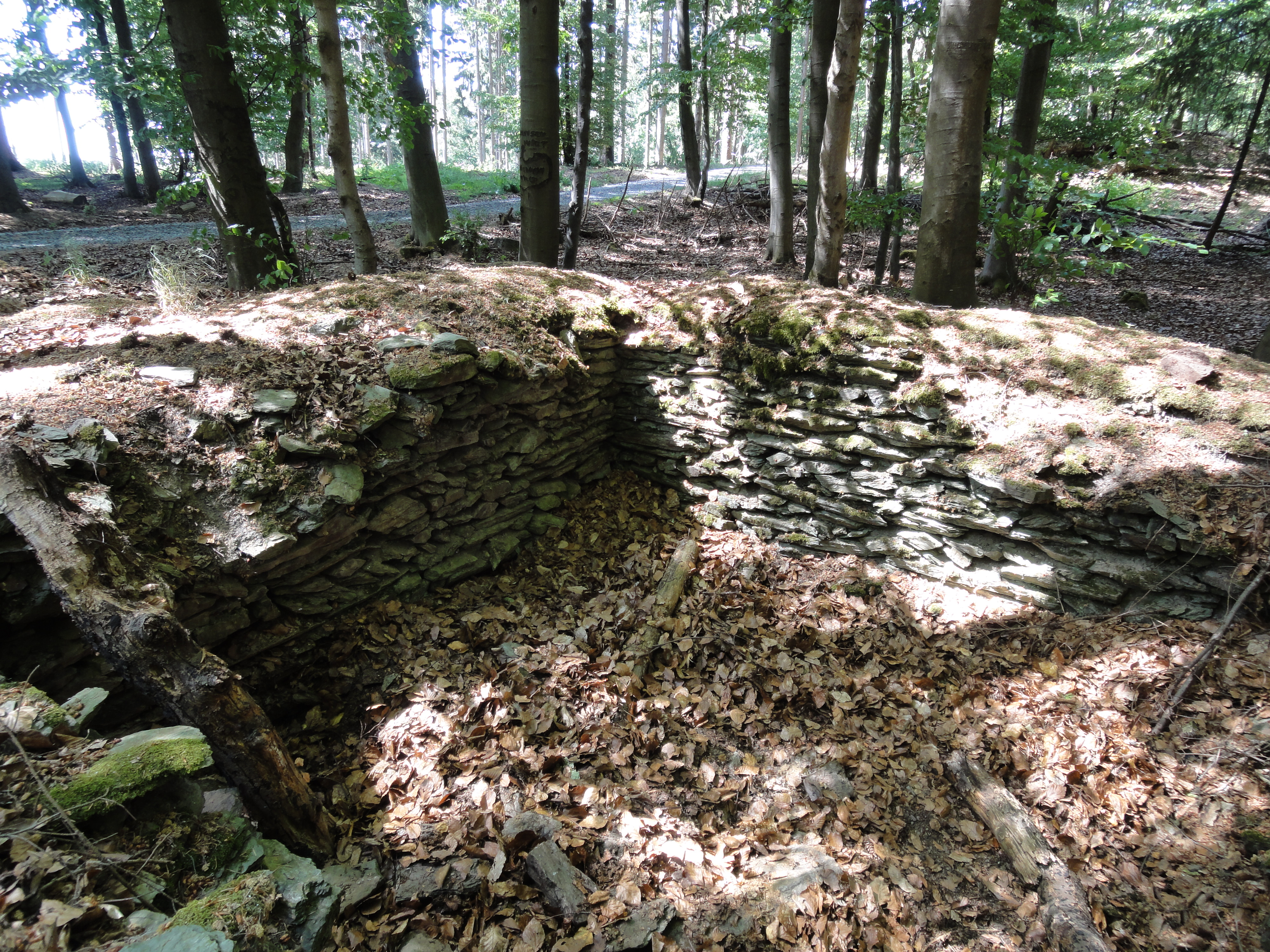 Reste des Wp 3/21 am Limes